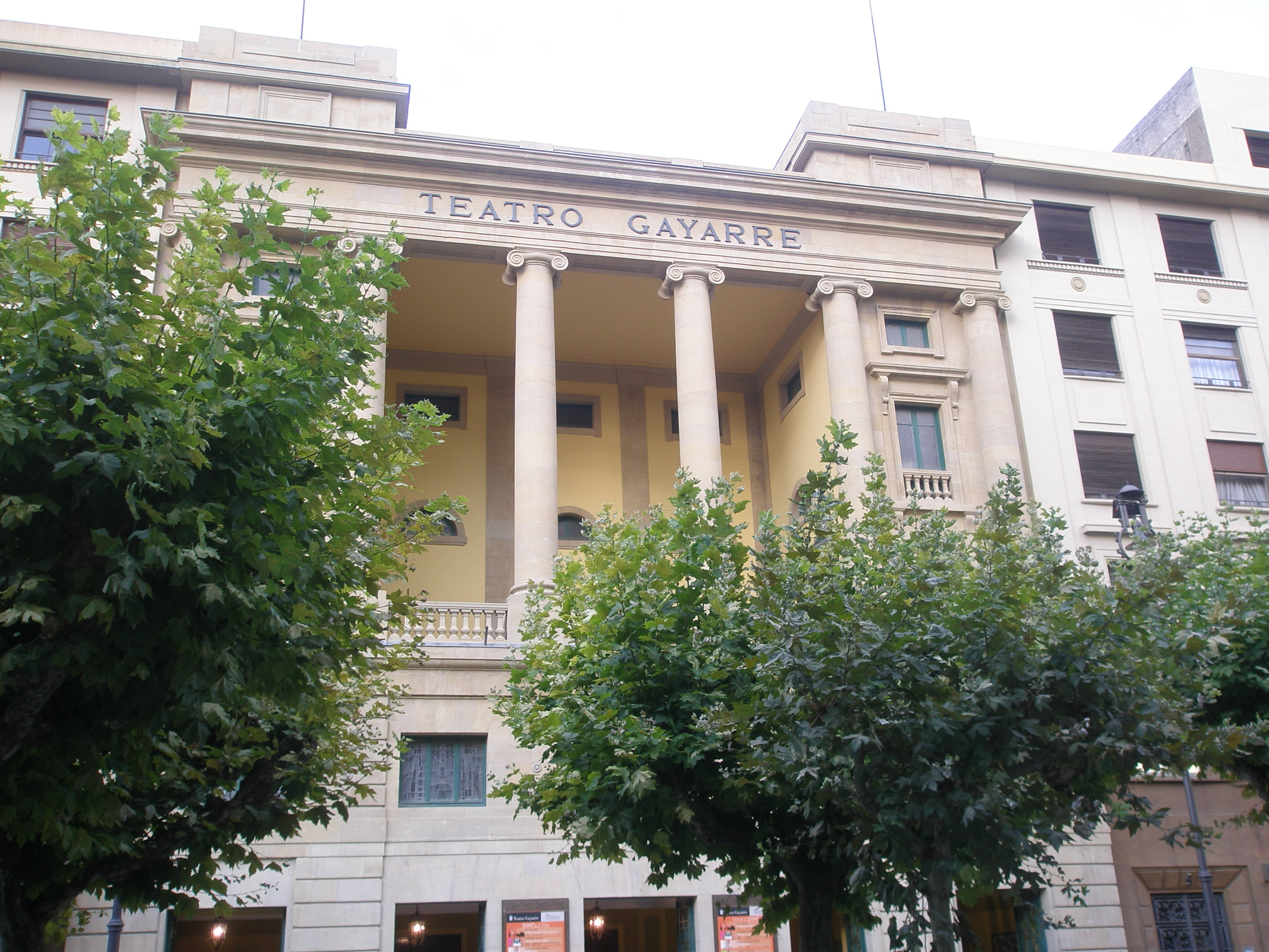 Teatro Gayarre, antes Principal, en su actual emplazamiento.